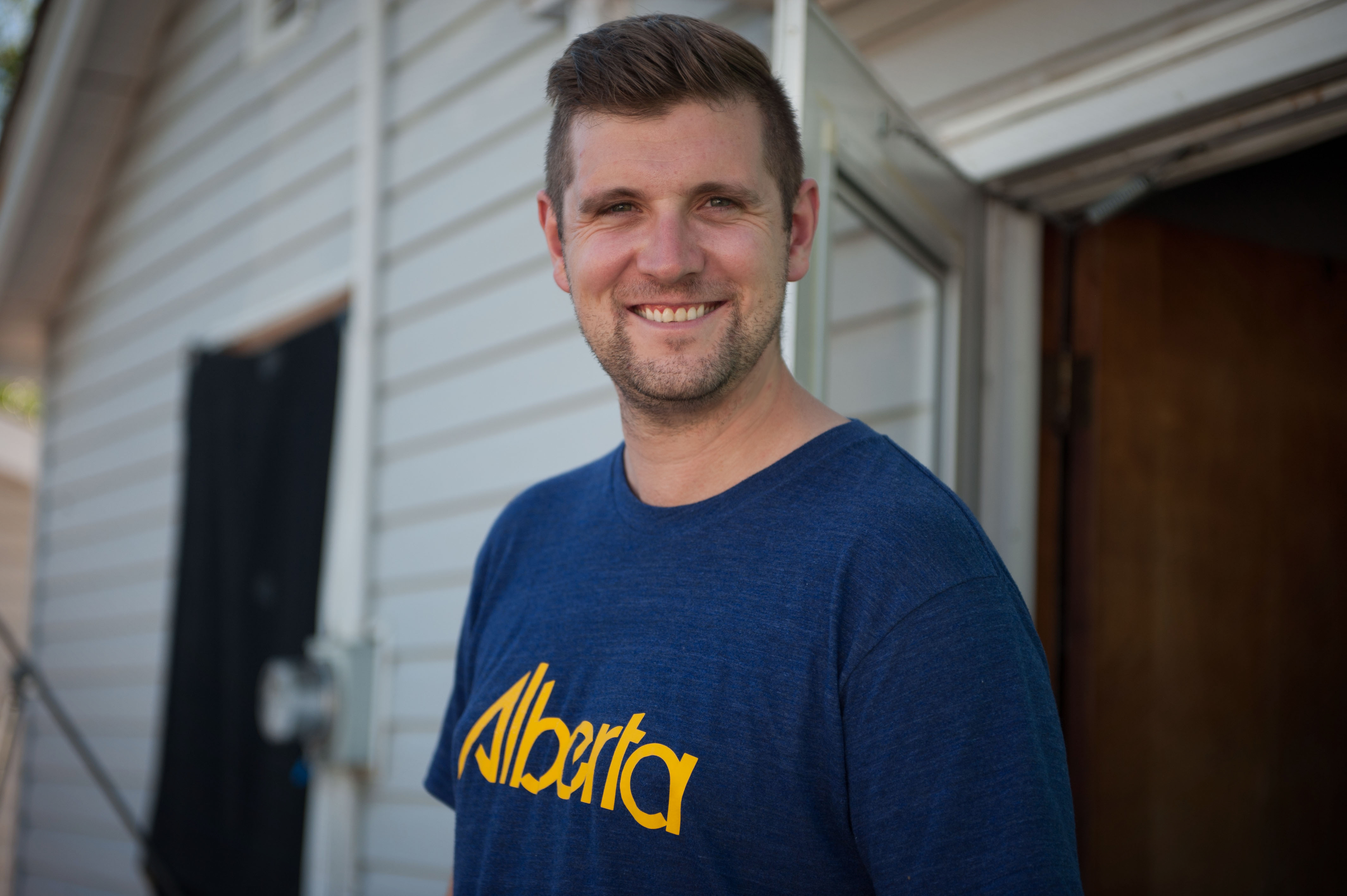 Kyle Thomas